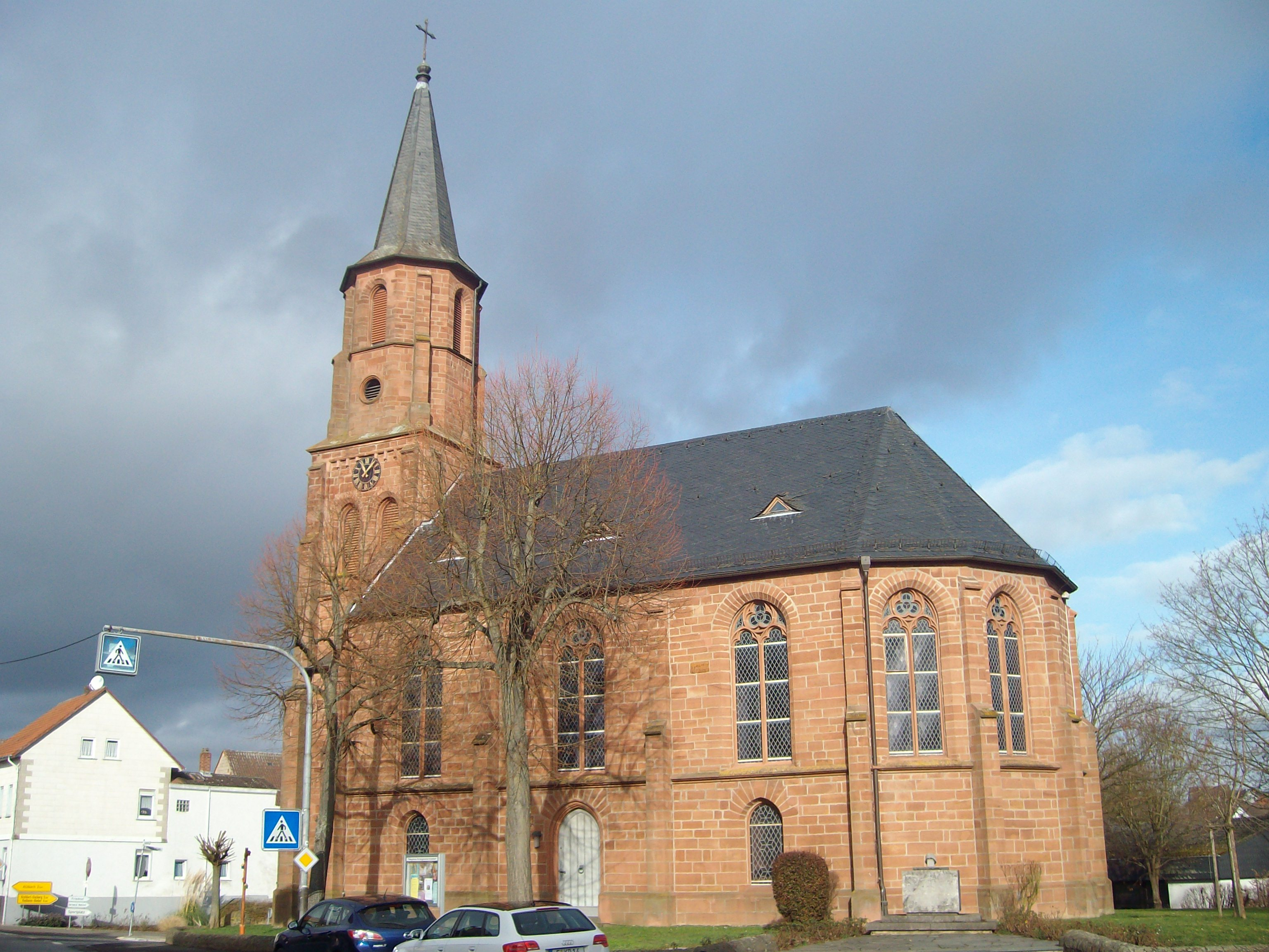 Evangelische Kirche Kinzenbach, Heuchelheim, Hessen, Deutschland